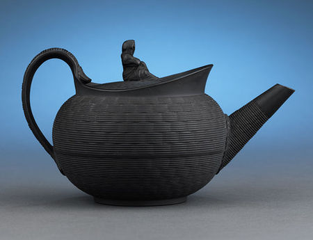 Théière Wedgwood 1780